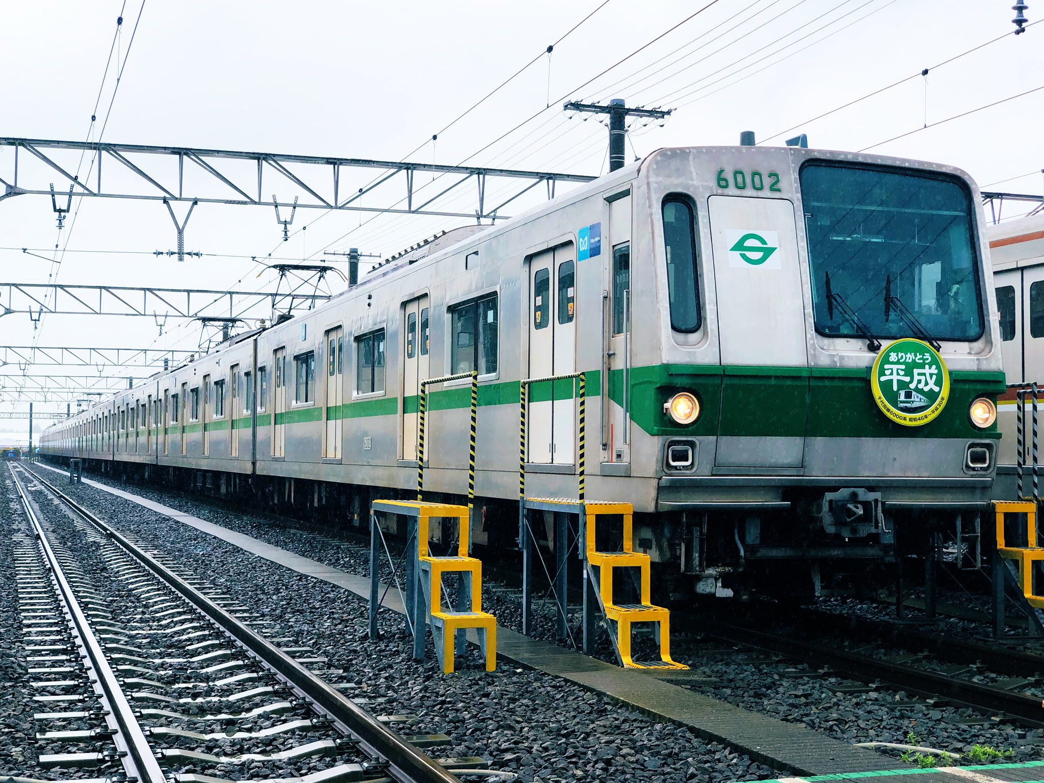 営団6000系6102F6002号車 新木場車両基地公開 2019/7/7